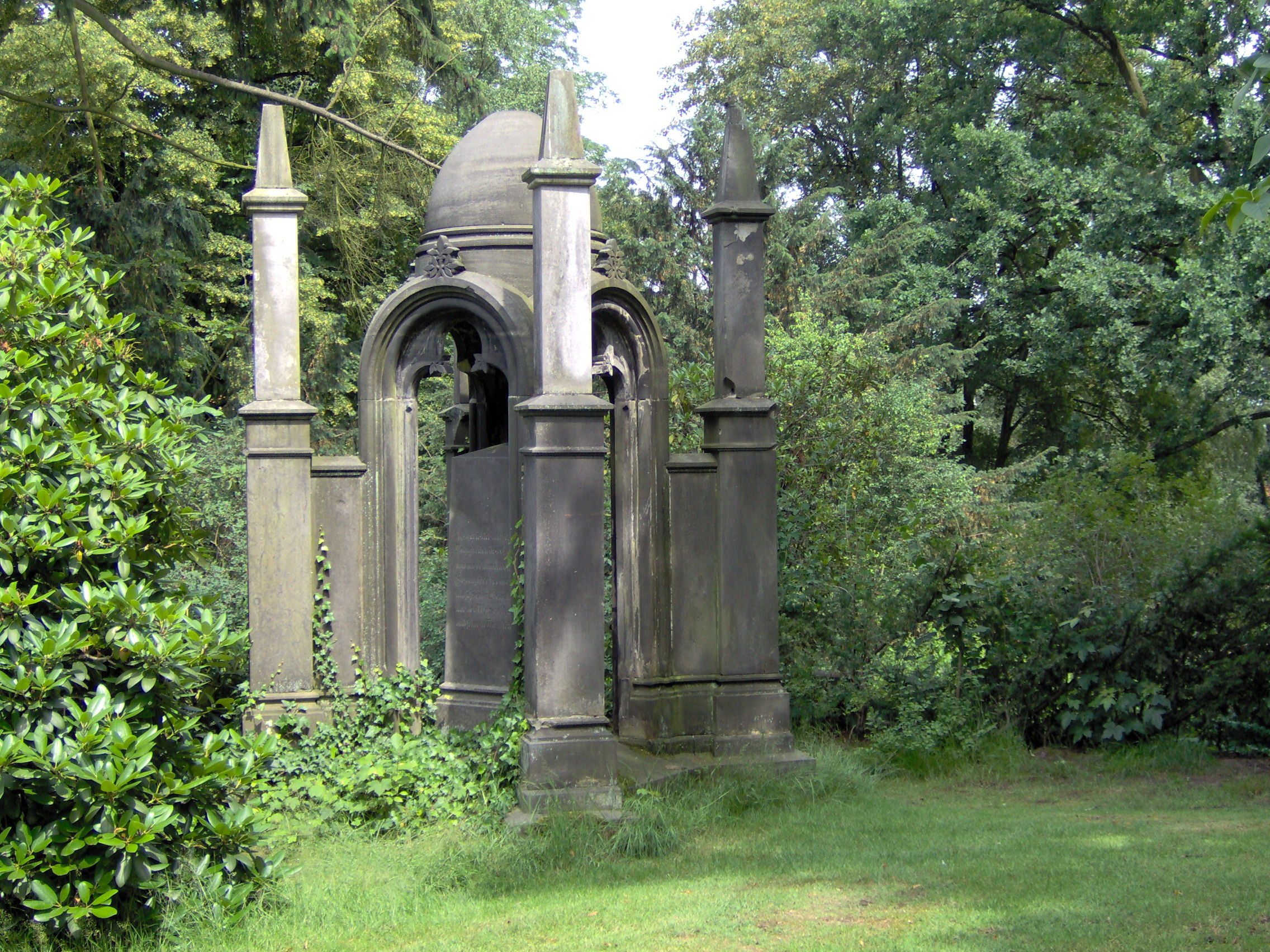 Grabmal Johann Heinrich Blohm - Alter Friedhof Harburg. Teil der Gesamtanlage.This is a photograph of an architectural monument.